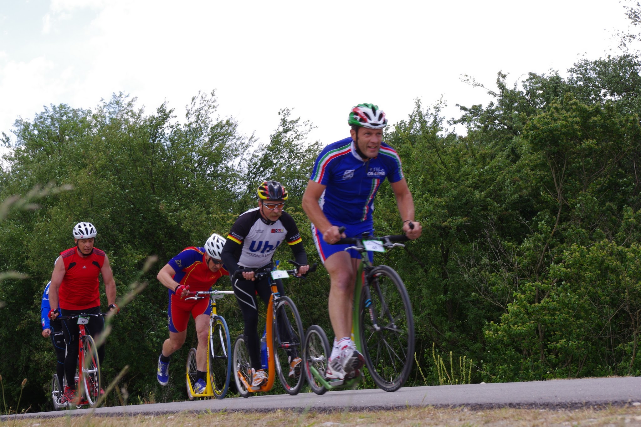 épreuve européenne de pédicycle au Grand-Parc de Miribel-Jonage en mai 2011